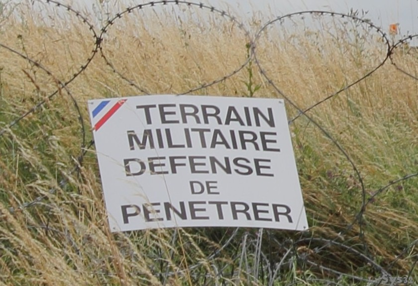 Panneau